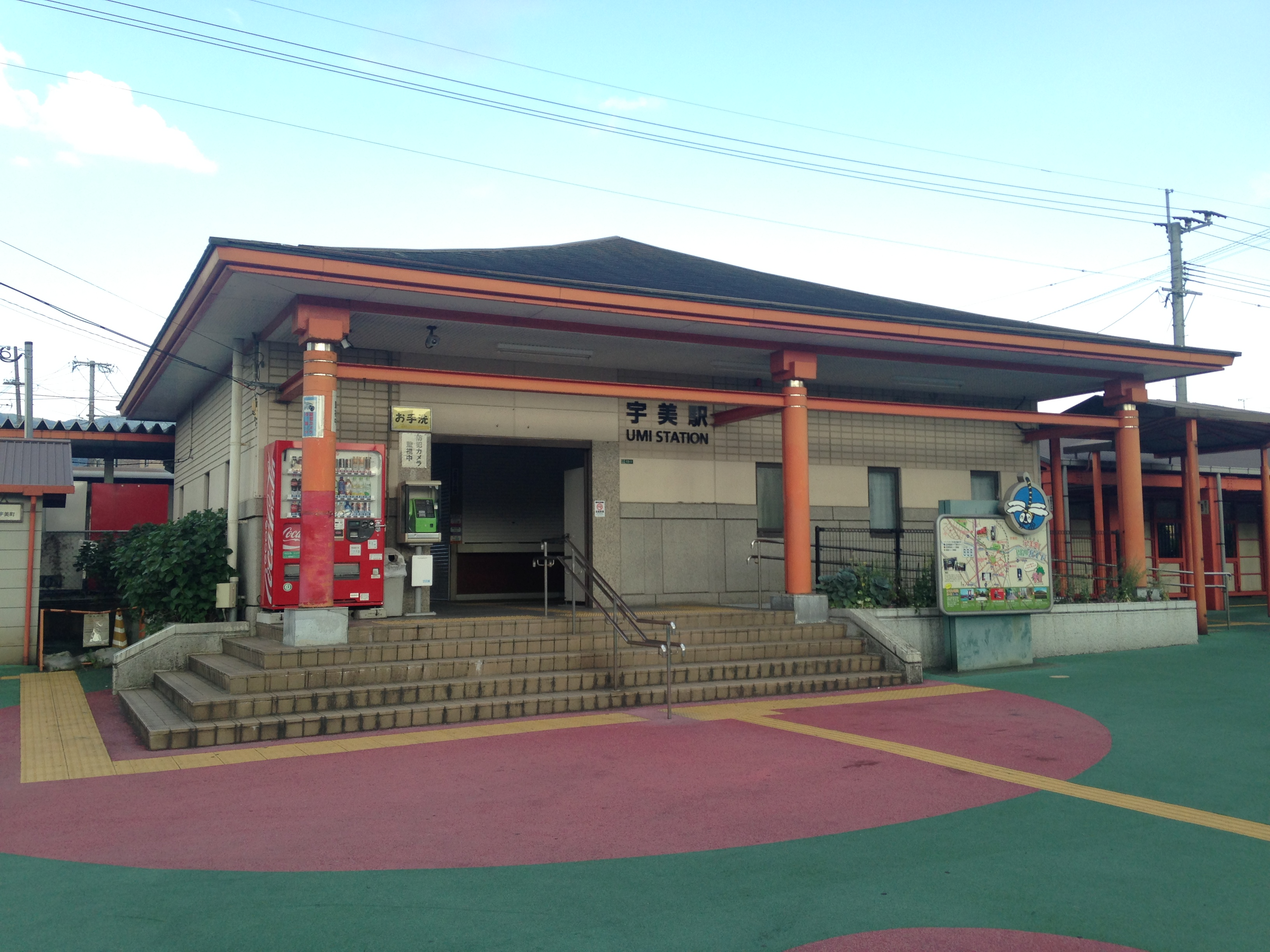 宇美駅駅舎